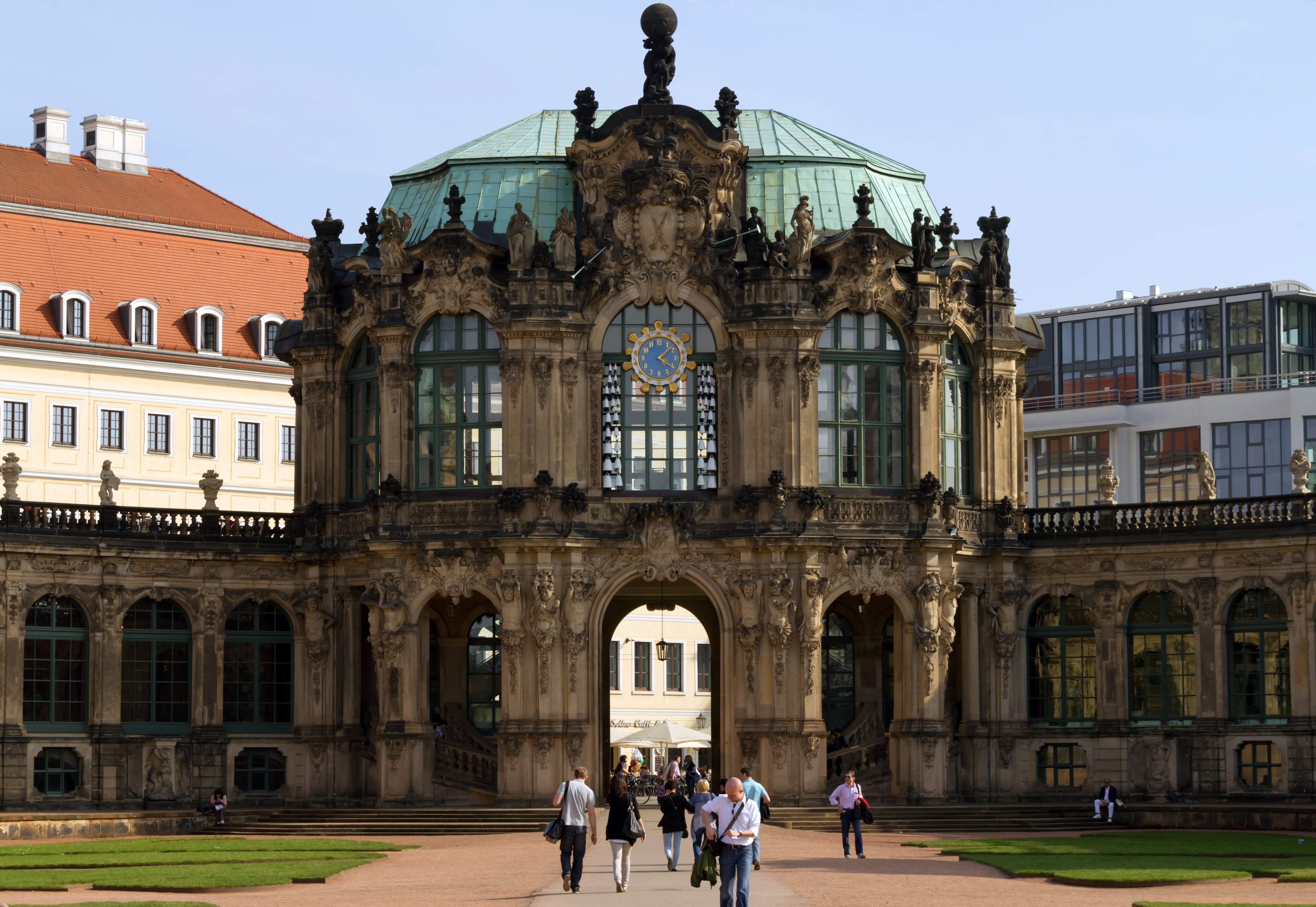 Stadtpavillon des Dresdner Zwinger